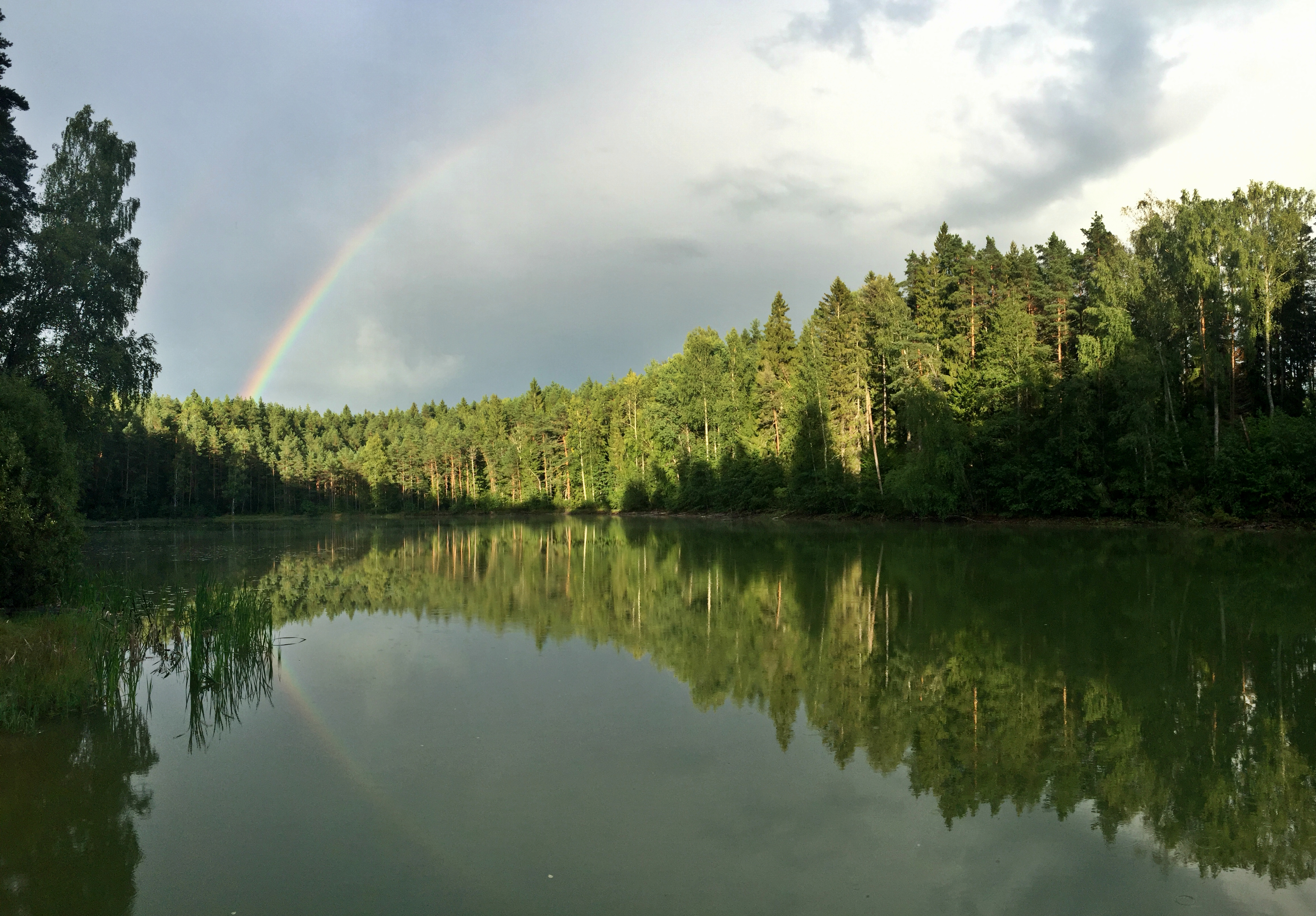 Jõuga järvestik